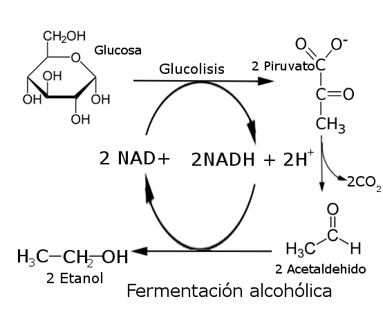 Fermentación del piruvato a etanol y CO2